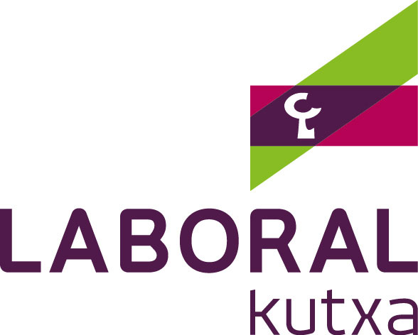 Logo de la entidad Laboral Kutxa